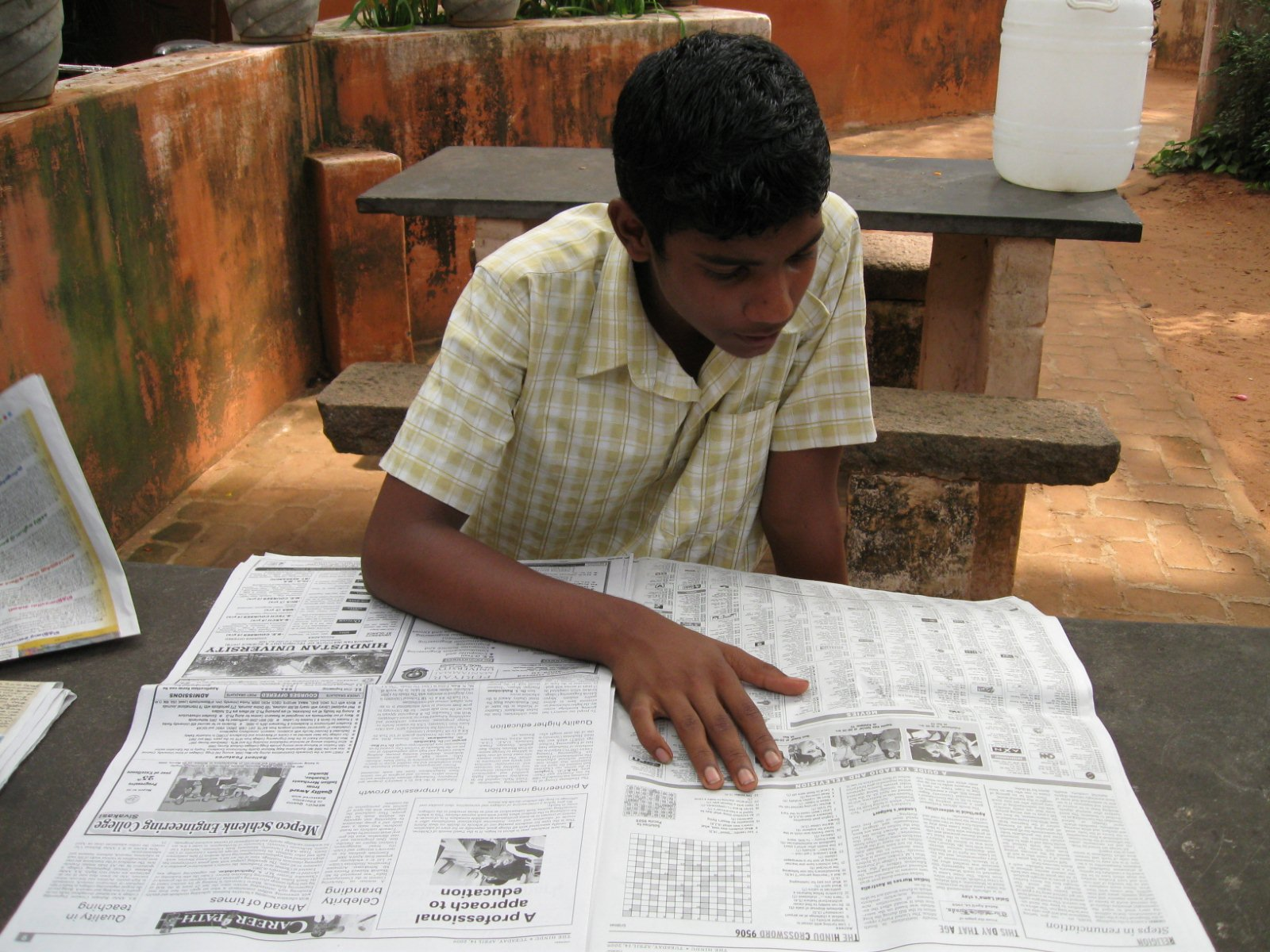 நாளிதழ் வாசிக்கும் ஒரு சிறுவனின் படம்